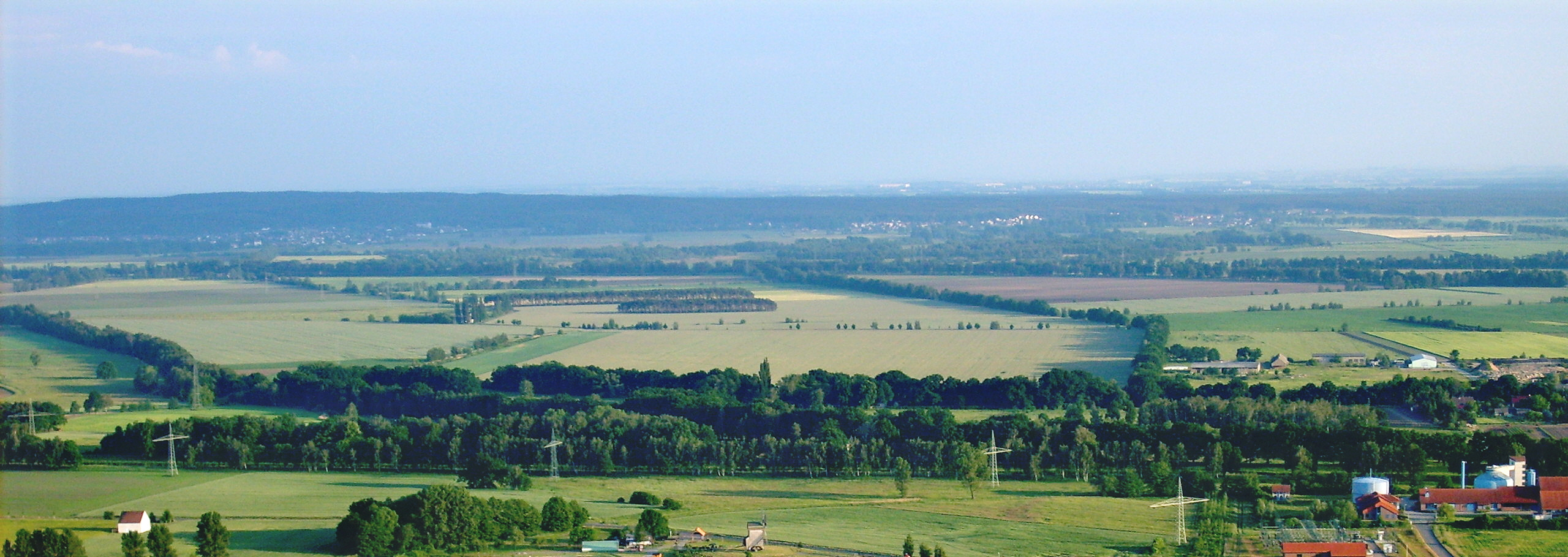 Der südwestliche Schraden südlich von Elsterwerda aus der Luft.